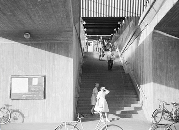 Uppgången till Tallkrogens tunnelbanestation